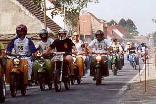 Einige Teilnehmer/ Teil des Fahrerfeldes der Rallye im Jahr 2001